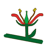 Morfología de la flor. Flor perfecta (bisexual) y pedicelada. Según Simpson (2005) Plant Systematics.